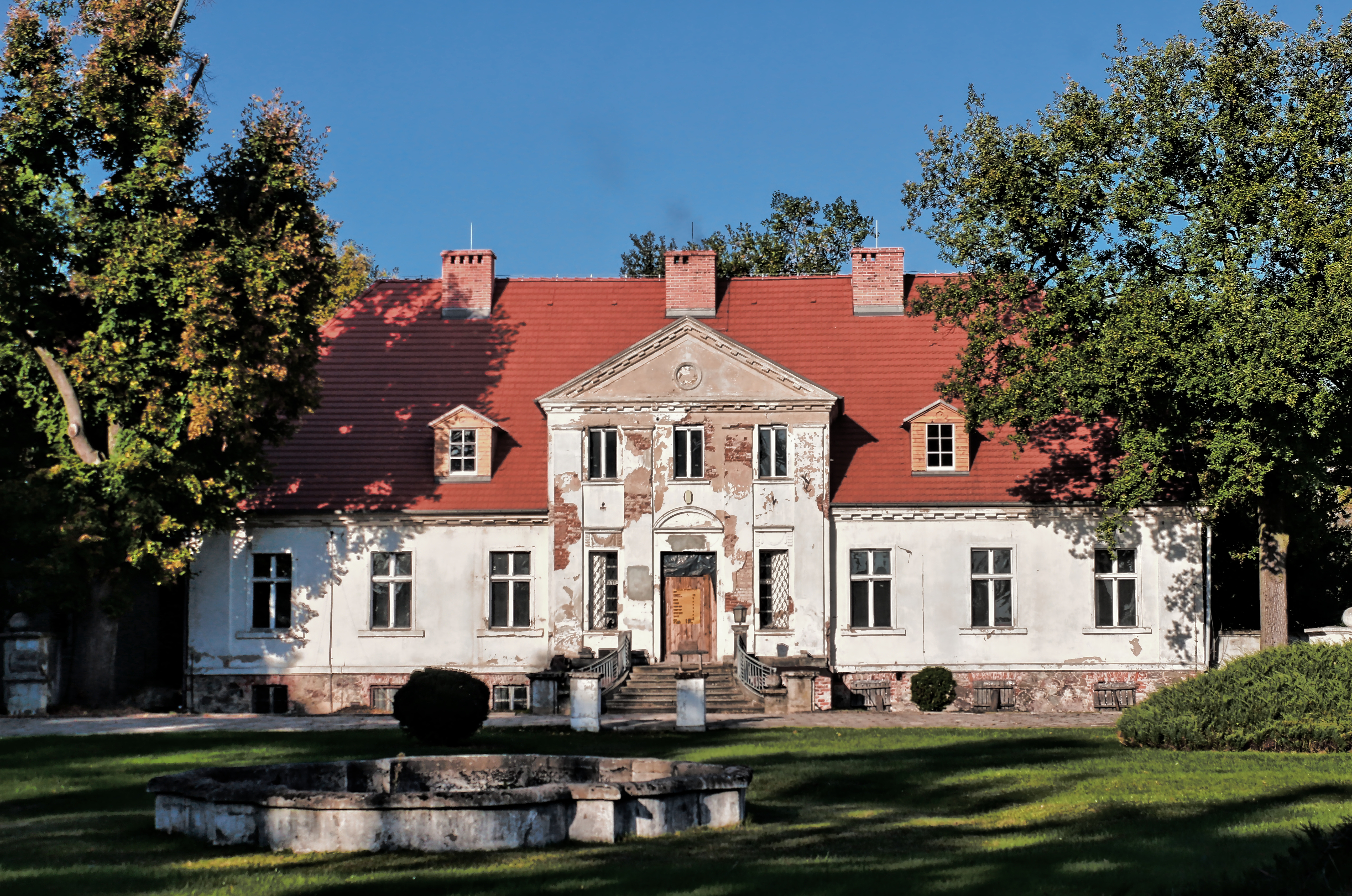 Osowa Sień (górna), dwór